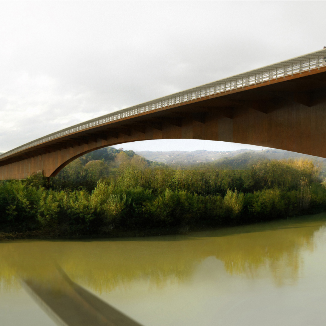 Etude pour un pont sur le fleuve Arno en Italie